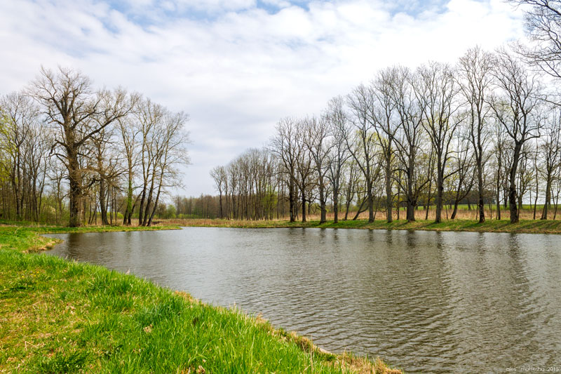 Свяцкі палац. Сажалка